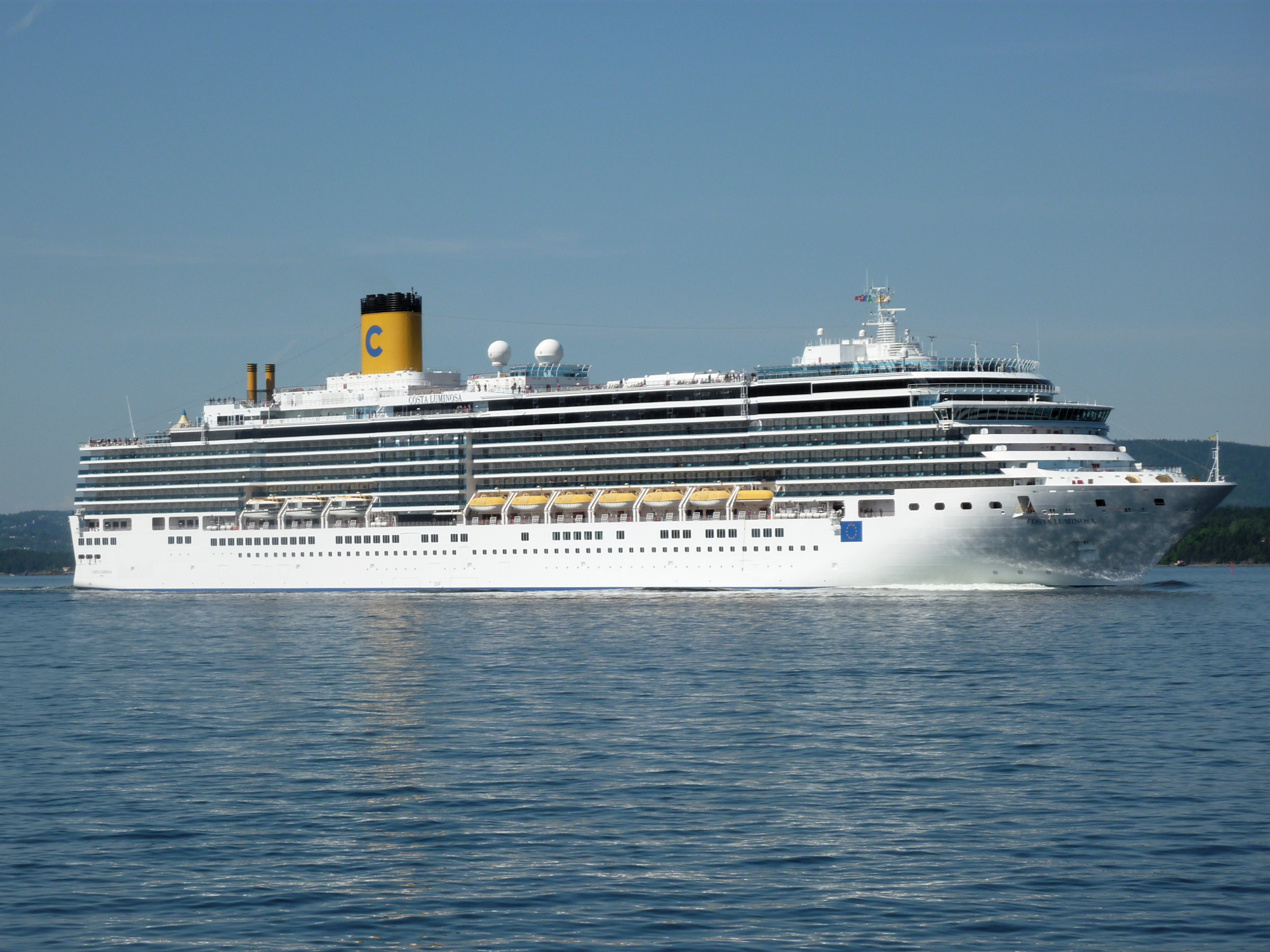 Creuer Costa Luminosa al Fiord d'Oslo